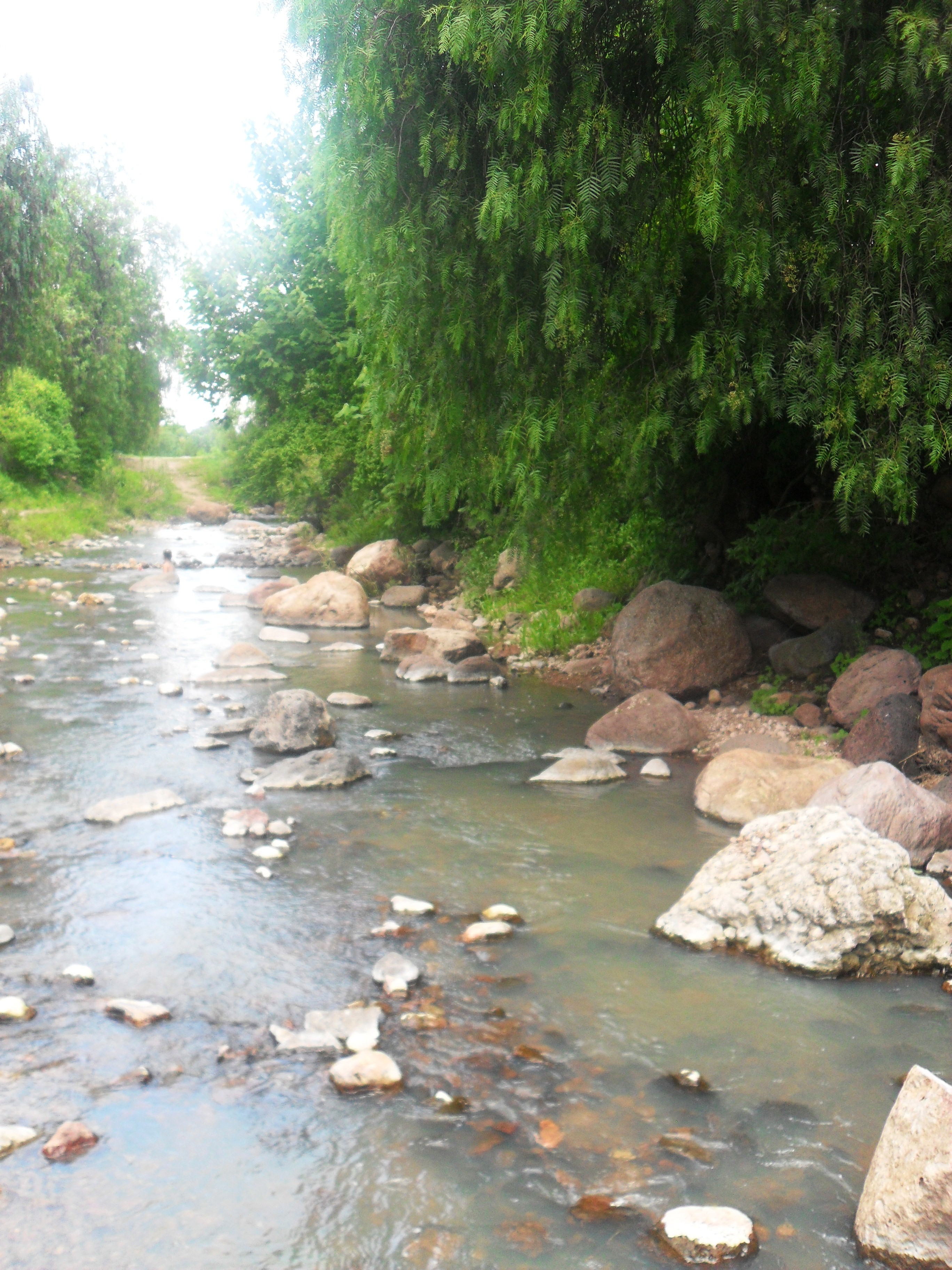 Arrollo Blanco de Huandacareo